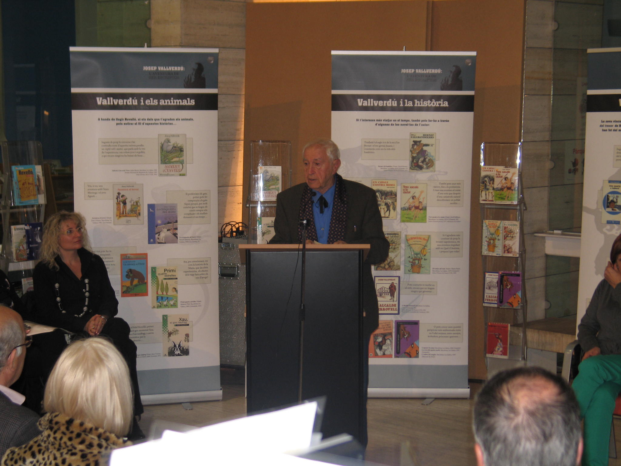 Josep Vallverdú Aixalà a la Biblioteca de Lleida en l'acte final del Passeig d'Aniversari.